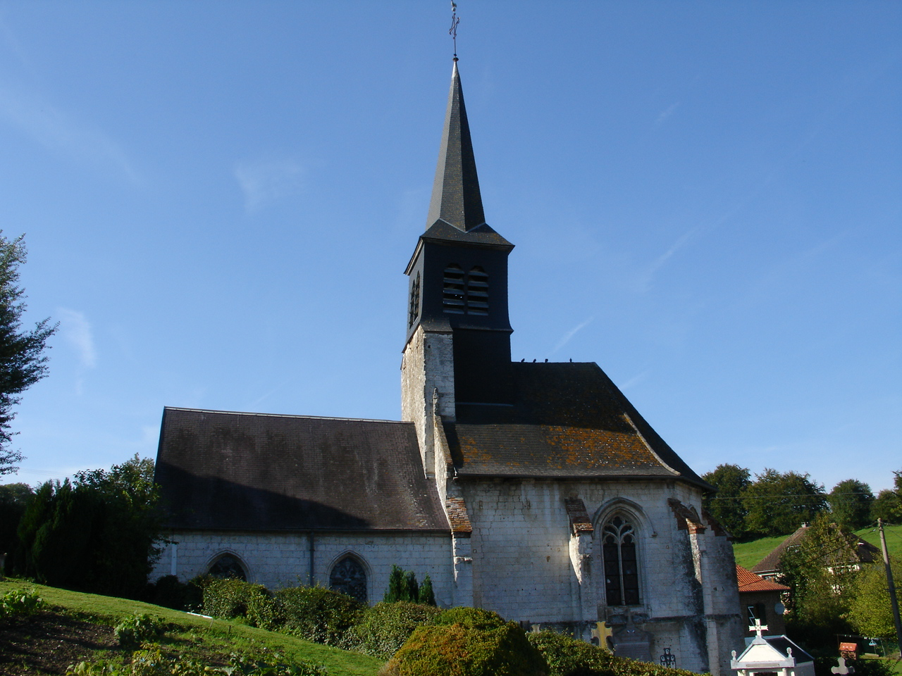 Église de Saint-Denoeux .